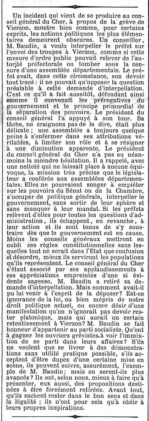 Article traitant de la grève de Vierzon. Article paru en première page du quotidien parisien Le Temps, 20 août 1886, 4ème colonne.